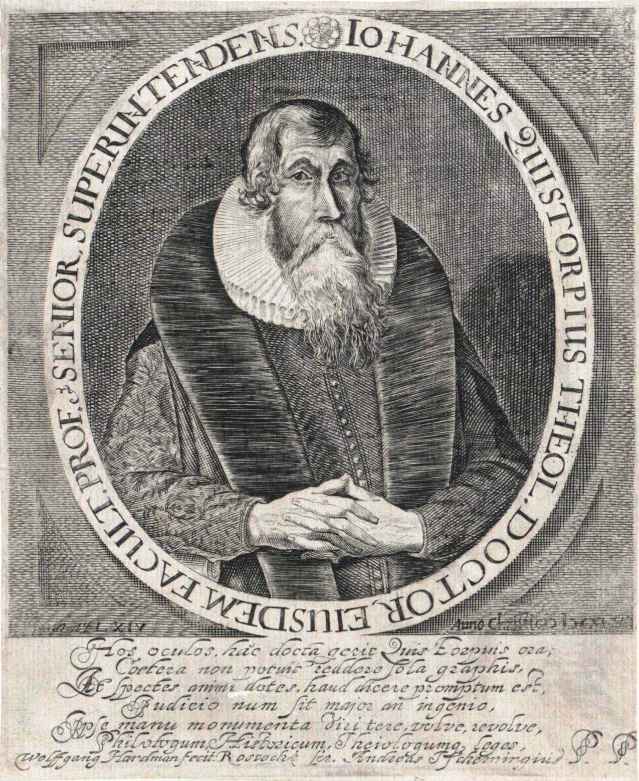 Johannes Quistorp der Ältere (1584–1648), deutscher evangelischer Theologe. Radierung